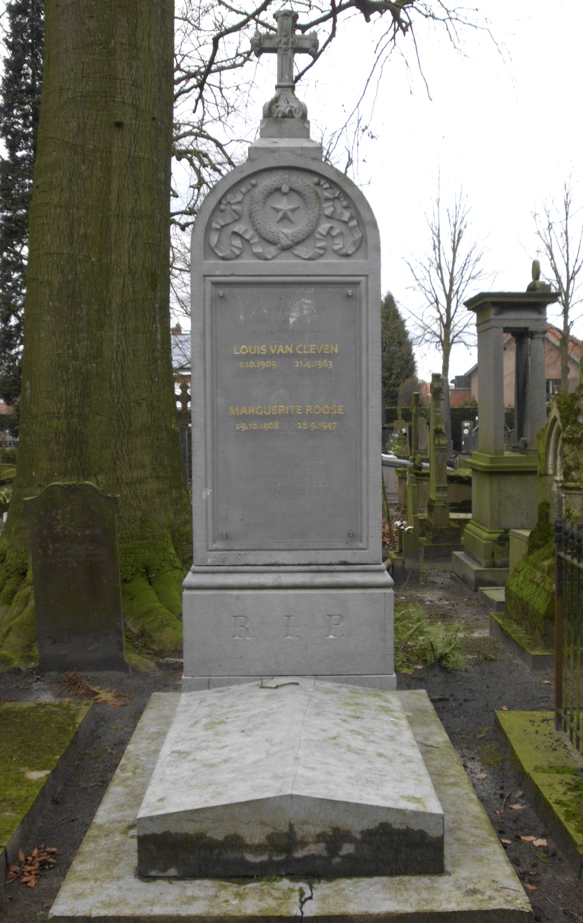 Centrale Begraafplaats (Brugge) - Voorbeeld van hergebruik grafsteen